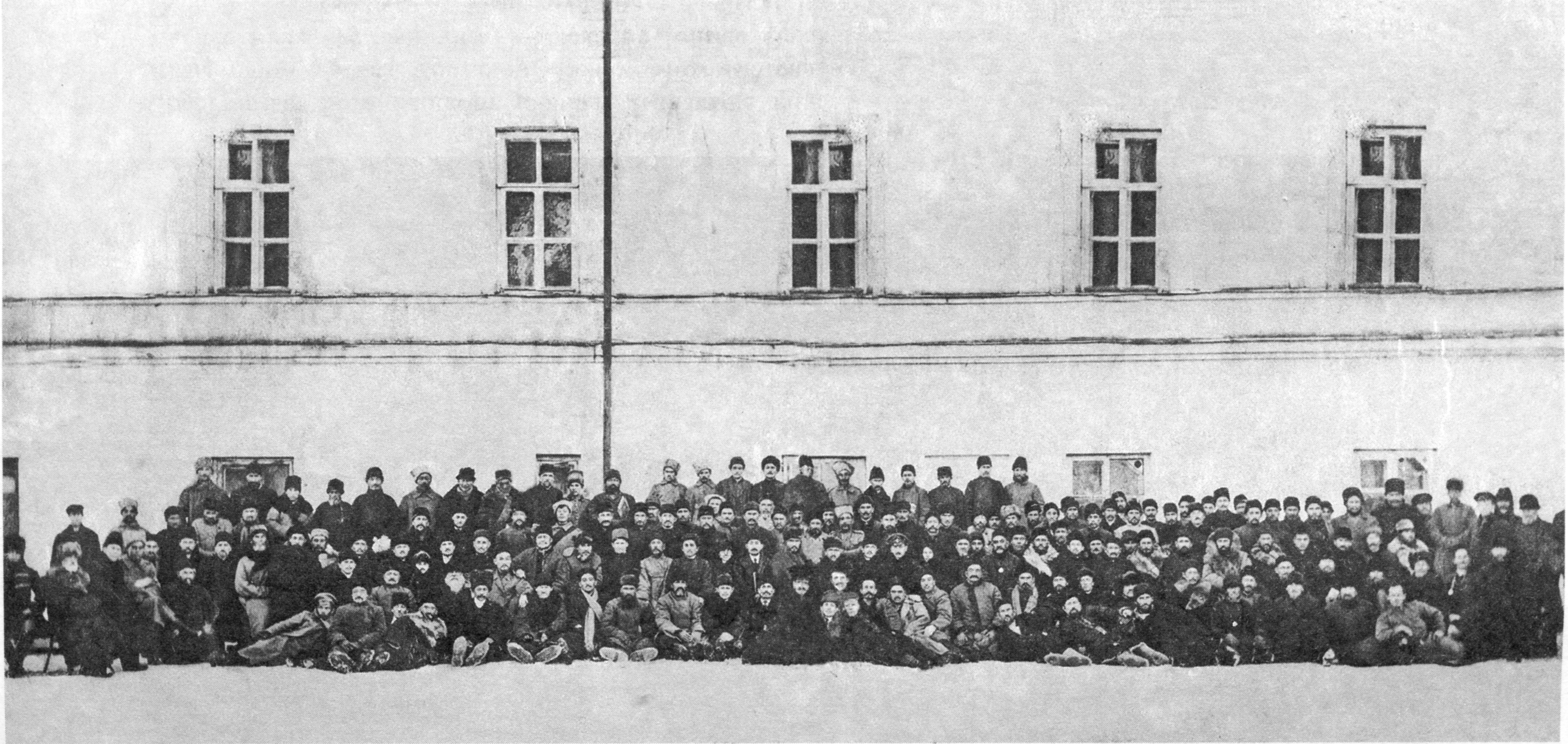 3-й Всебашкирский учредительный съезд в г.Оренбурге. 8-20 декабря 1917.